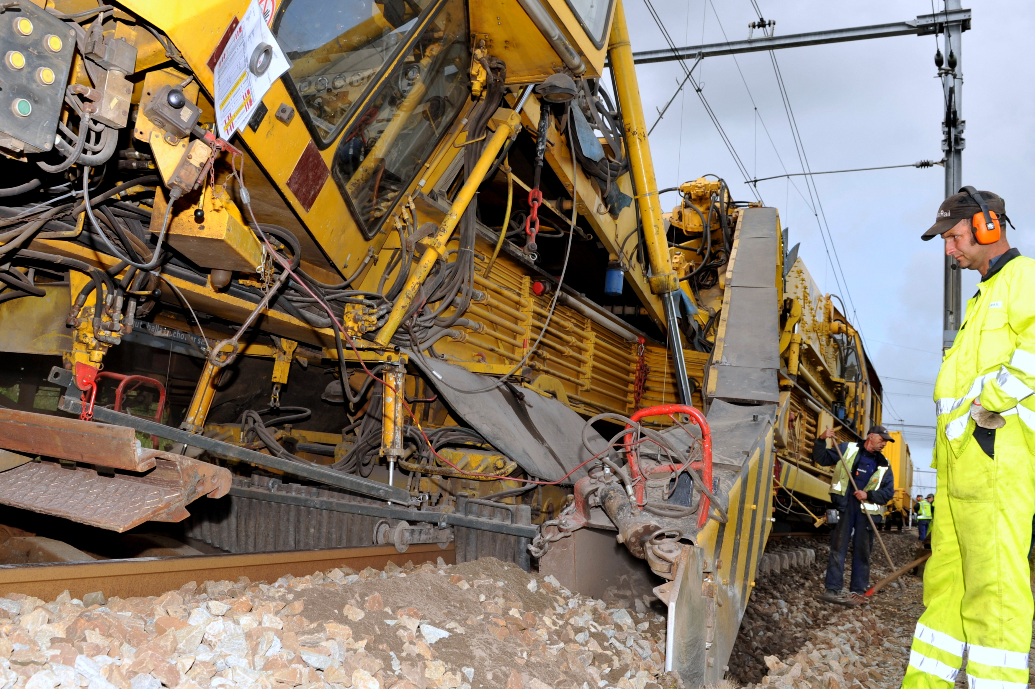 Dit weekend is het treinverkeer tussen Zaandam en Hoorn gestremd. Volkerrail is in opdracht van ProRail de ballast van deze spoorlijn machinaal aan het vernieuwen. Dit wordt gedaan met een "kettinghor".